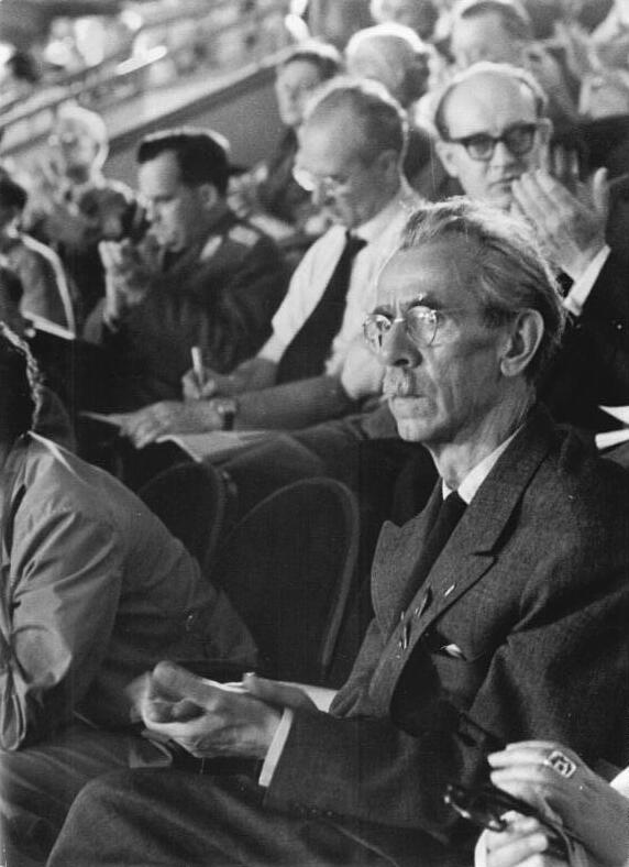 Berlin, V. SED-Parteitag, Otto Nagel Zentralbild 10.7.1958 V. Parteitag der SED vom 10. bis 16.7.1958 in der Werner-Seelenbinder-Halle, Berlin. 1. Tag UBz: Der Präsident der Deutschen Akademie der Künste, Professor Nagel, unter den Gästen des V. Parteitages 57. (Ulmer) Abgebildete Personen: Nagel, Otto Prof.: Maler, Präsident der Akademie der Künste (AdK), Nationalpreisträger, Vaterländischer Verdienstorden (VVO) in Gold, DDR (GND 118586300)